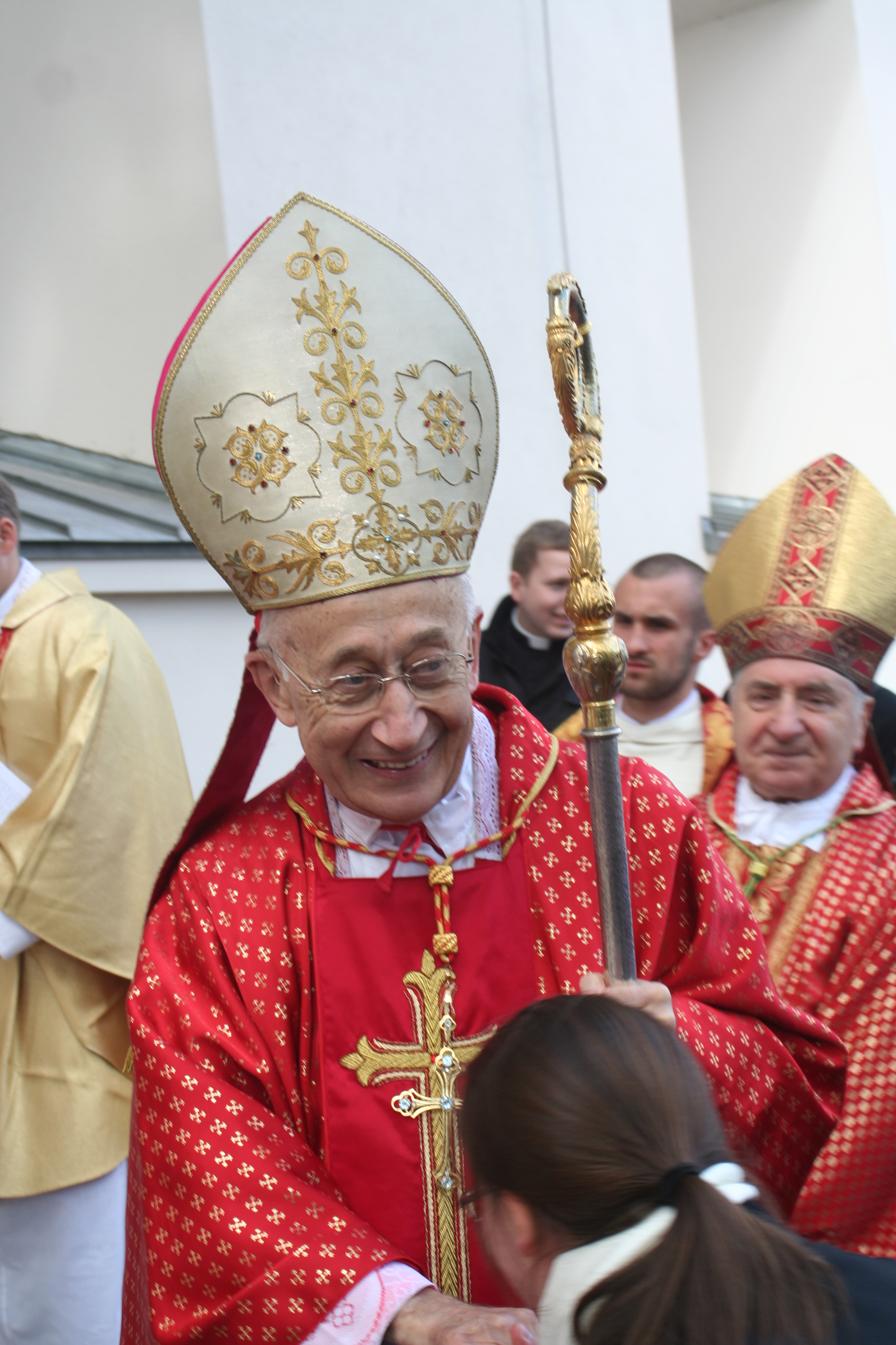 Tradycyjna Procesja ku czci św. Stanisława z Wawelu na Skałkę. Kardynał Camillo Ruini